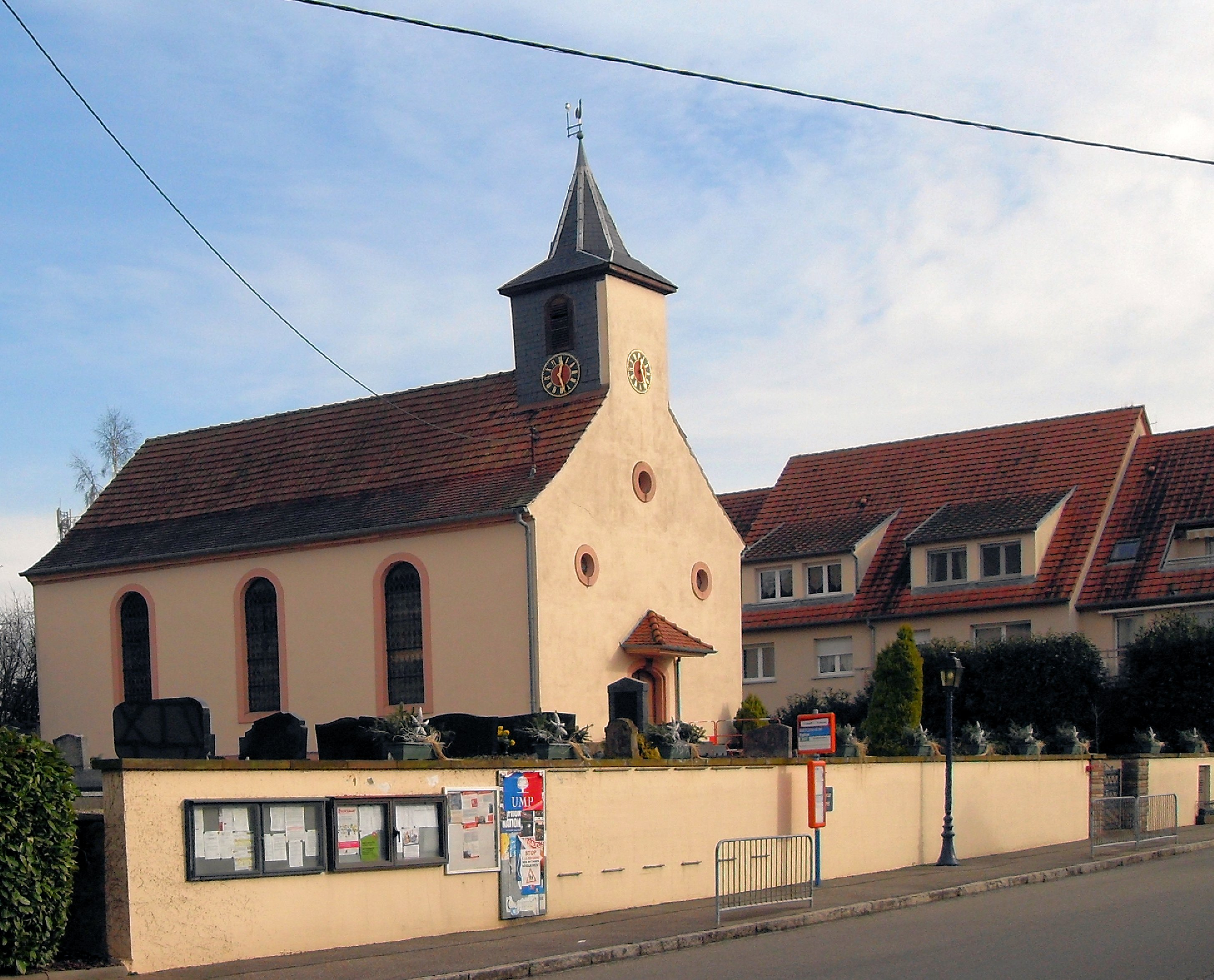 L´Église luthérienne de Bietlenheim a été construite en 1835 à l'emplacement de l'ancienne chapelle Saint-Arbogast, mentionnée dès 1371